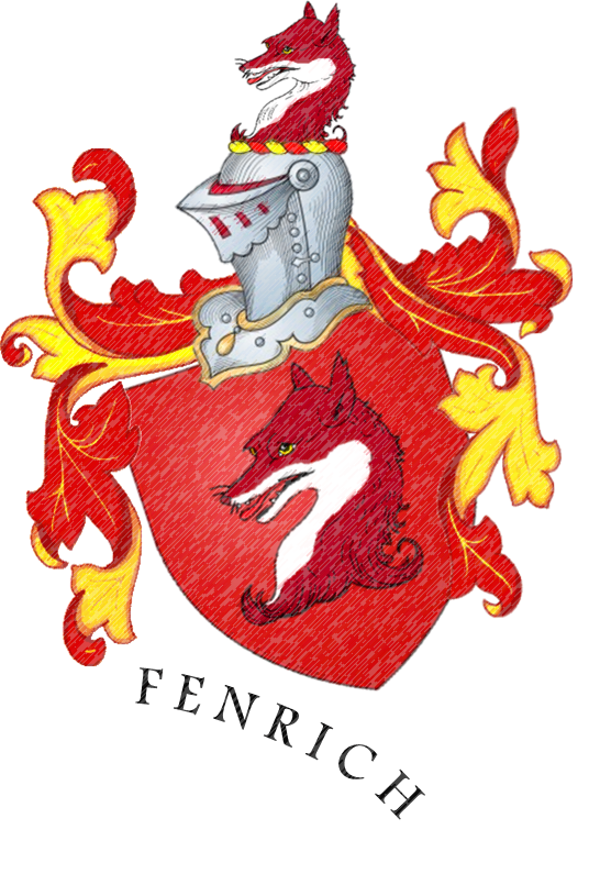 Wappen der Familie Fenrich von Gjurgjenowatz. Blasonierung: In Rot ein Fuchskopf in natürlichen Farben. Auf dem rot-golden bewulsteten Helm ein Fuchskopf in natürlichen Farben, Helmdecken rot-golden.